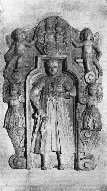 Metlika, Belokranjski muzej; lapidarij v cerkvi sv . Martina; nagrobnik 1626 umrlega Andreja Butgstahla iz gradu Krupa.